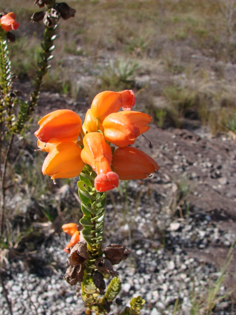 Physocalyx major - OROBANCHACEAE - Parque Estadual do Biribiri - Serra do Espinhaço - Diamantina - Minas Gerais - Brasil.